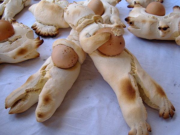 Pippia Cun S'Ou Pane Pasquale Bambolina di pane con un uovo in corrispondenza della pancia, simbolo di buon auspicio e di maternità per le donne. Giba, Sardegna